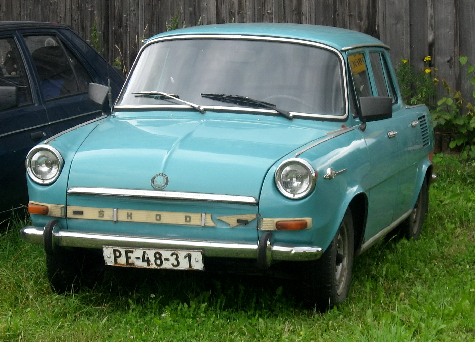 Stará škodovka